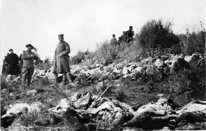 167 cadavres de recrues serbes mortes pendant une nuit, soldats serbes sur l'île de Vido .